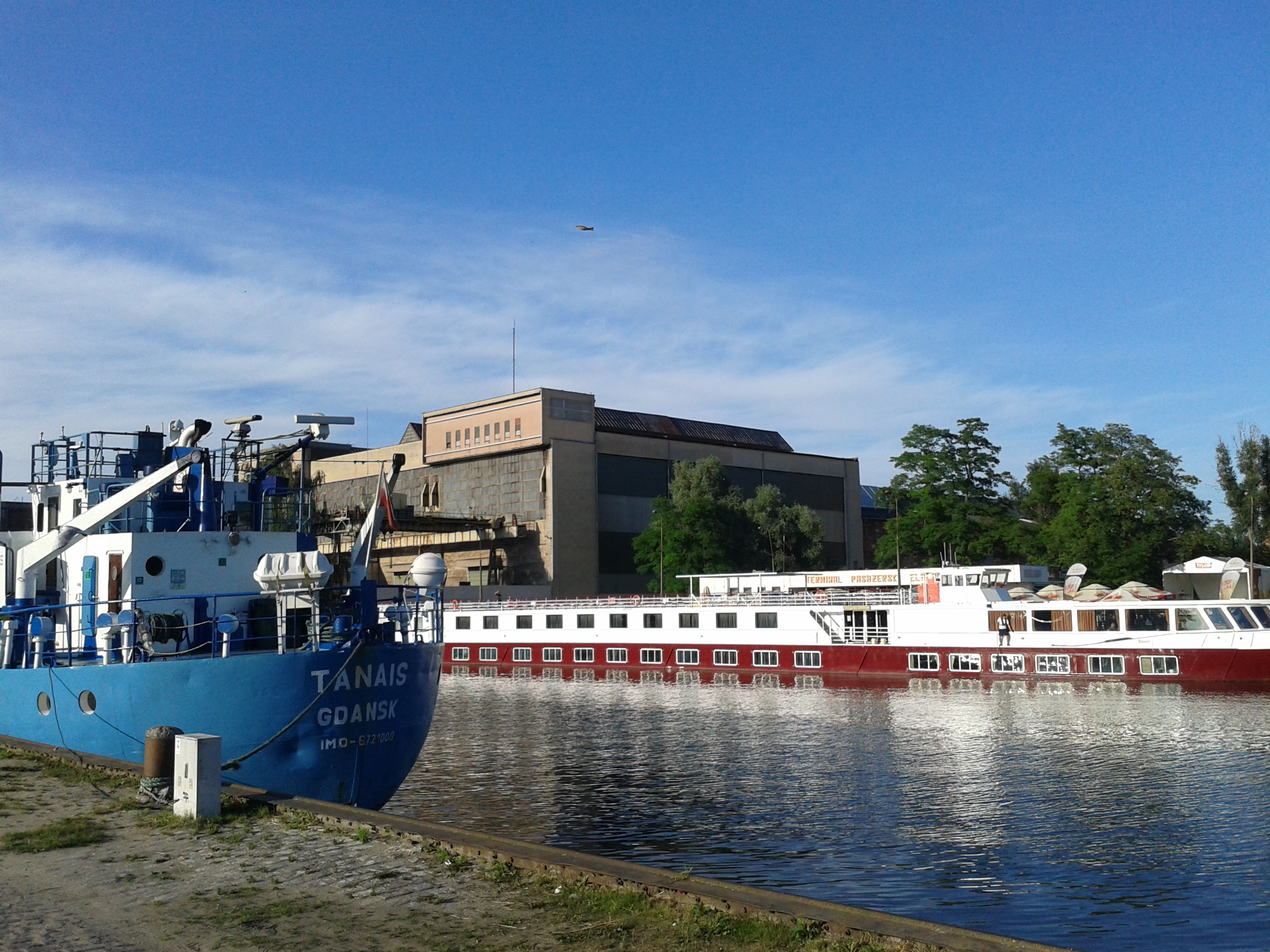 Port Elbląg, MV Tanais i MS Johannes Brahms.